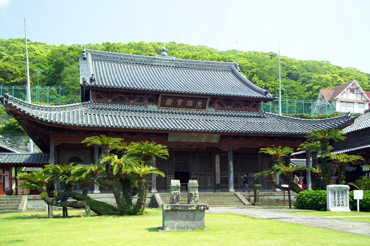 Main hall (Meditation Hall) (本堂), called 大雄宝殿, at Kōfuku-ji, Nagasaki, Japan